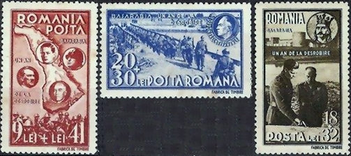 Marci postale emise de Posta Romana in 1942 cu ocazia aniversarii unui an de la eliberarea Basarabiei de sub ocupatia sovietica.